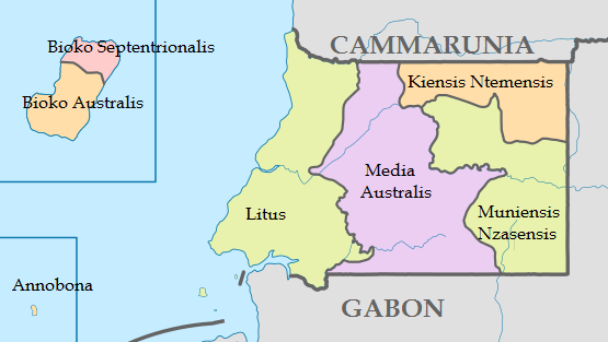 Provinciae Guineae Aequinoctialis Latine.